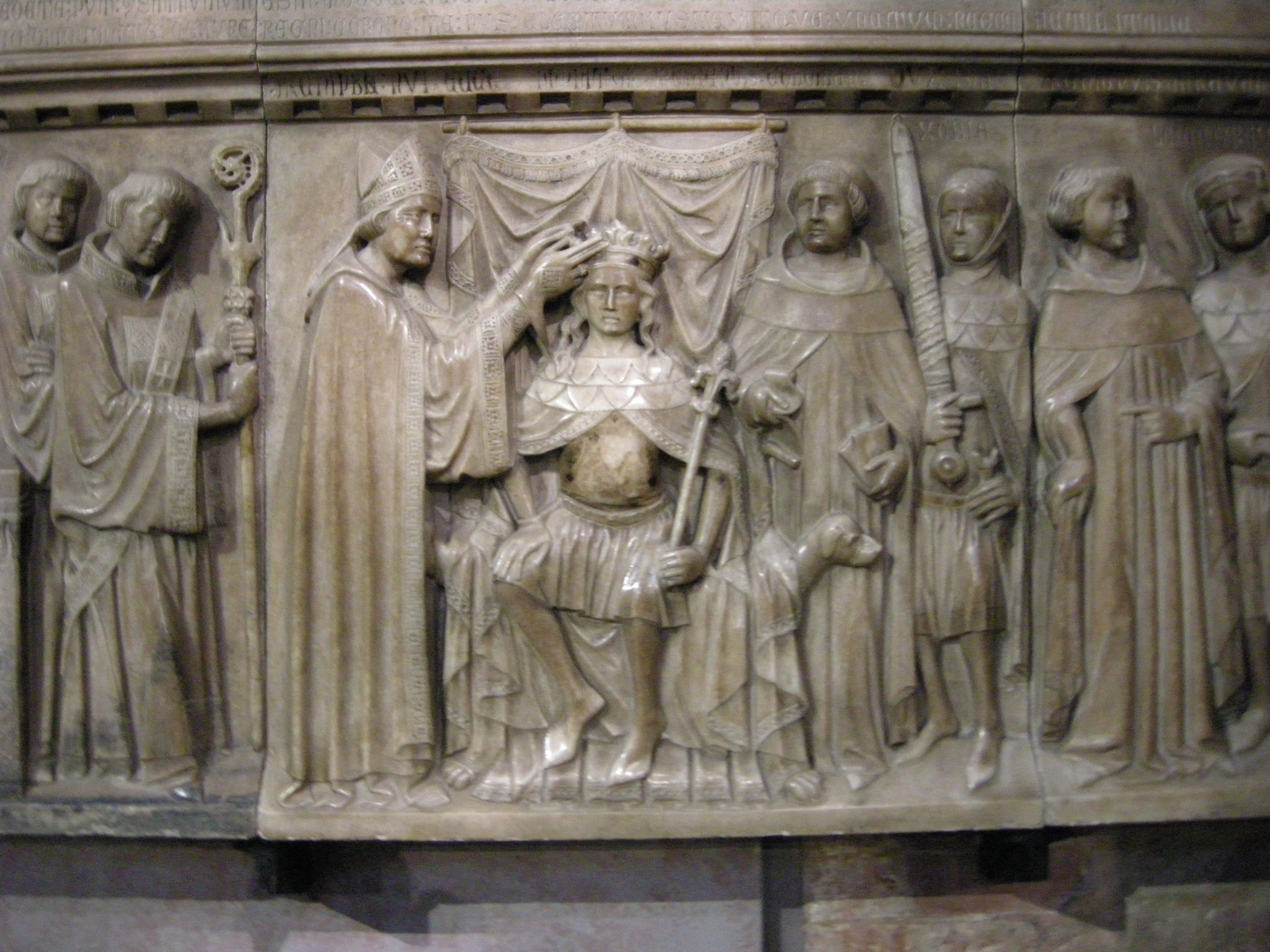 Duomo di monza, bottega di matteo da campio, lastra dell'incoronazione